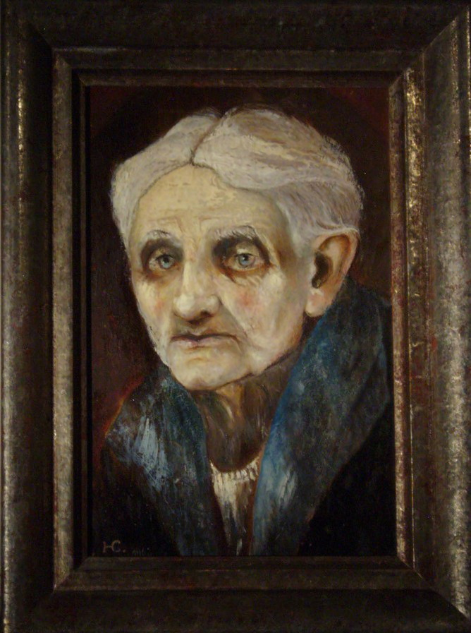 Foto aus der eigenen Sammlung der Werke des Onkels Herbert Capeller